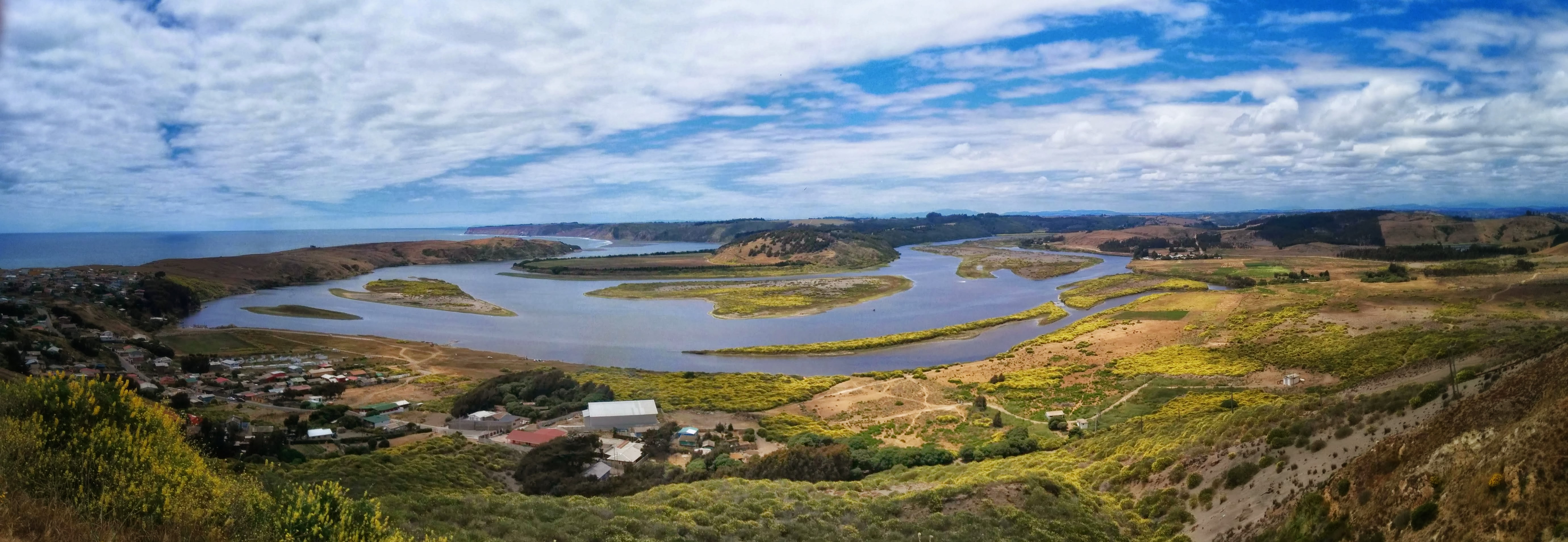 La Boca de Rapel, ubicado en la comuna de Navidad, VI Región, paisaje